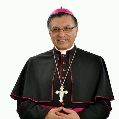 obispo